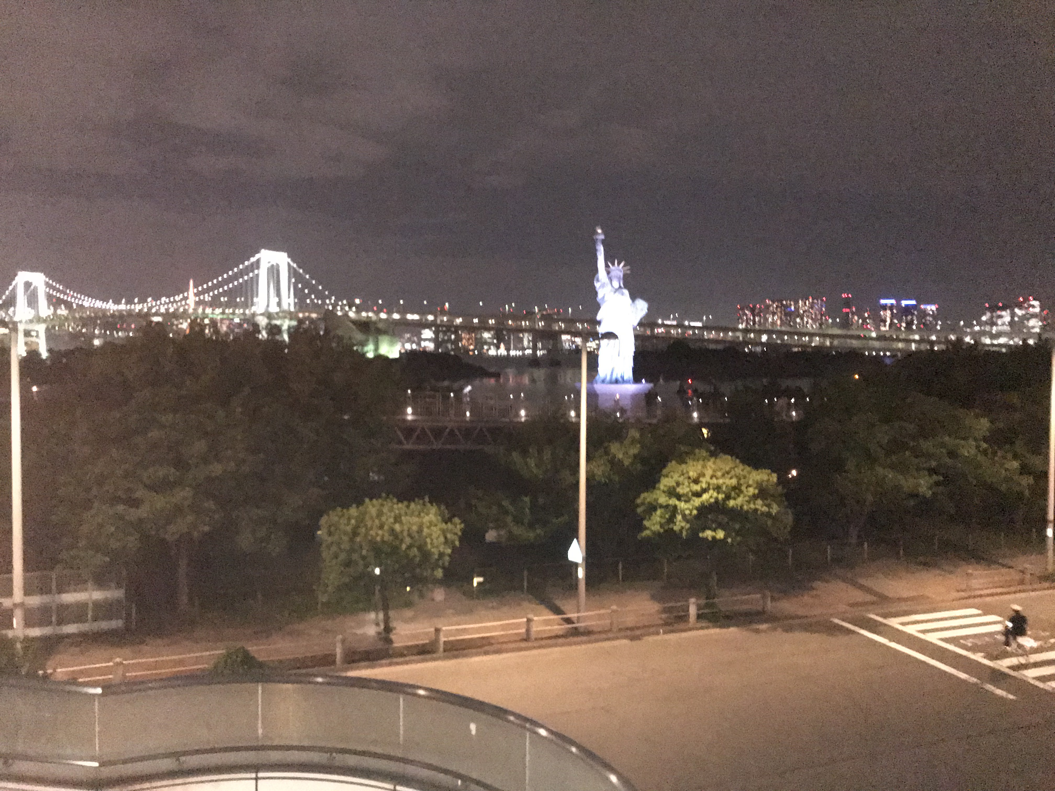 Odaiba, estatua da liberdade